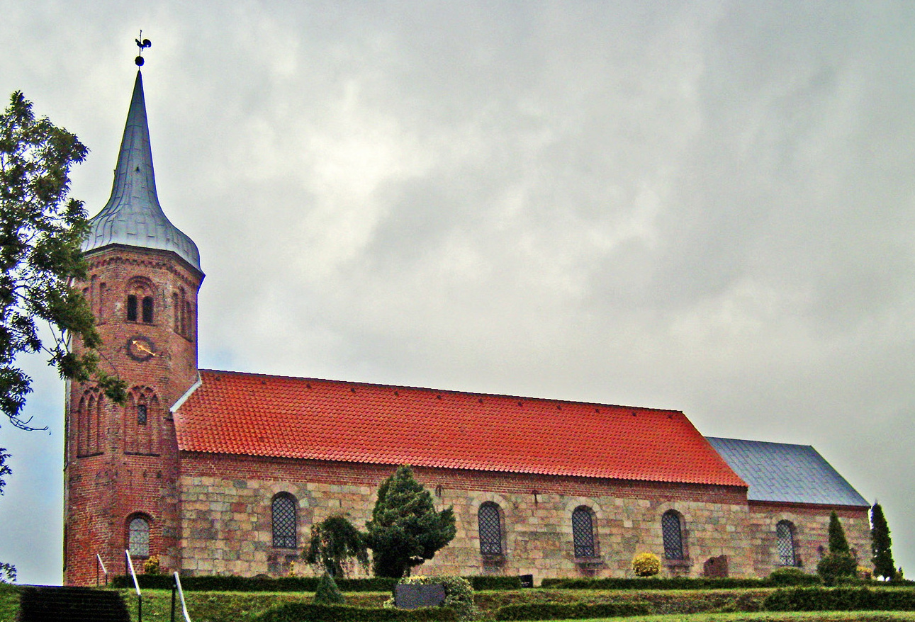 Astrup kirke (Mariagerfjord) fra sydvest